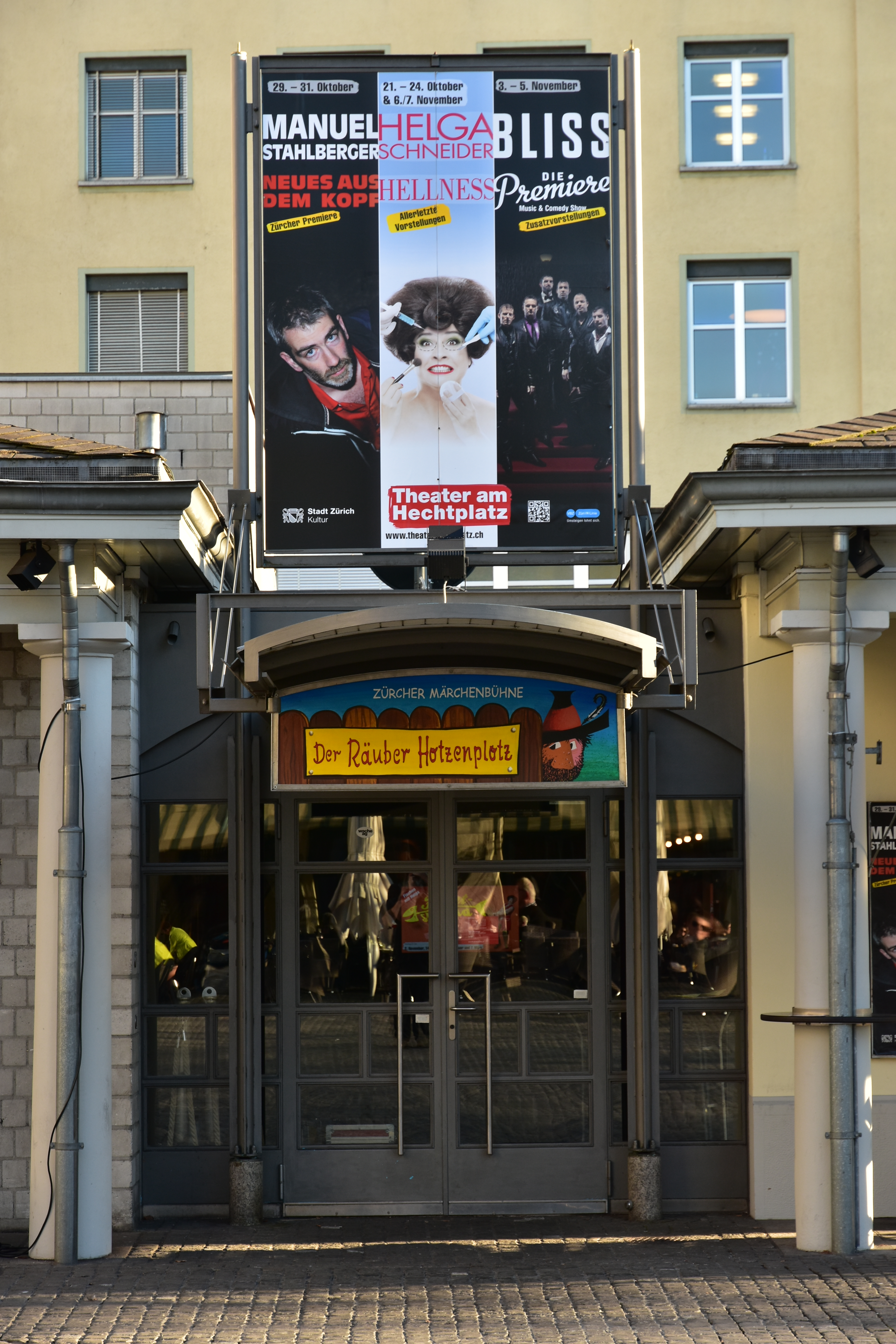 Theater am Hechtplatz respectively Zürcher Märchenbühne, Limmatquai in Zürich (Switzerland)